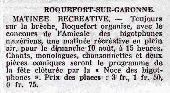 Annonce d'une fête avec des bigophones.